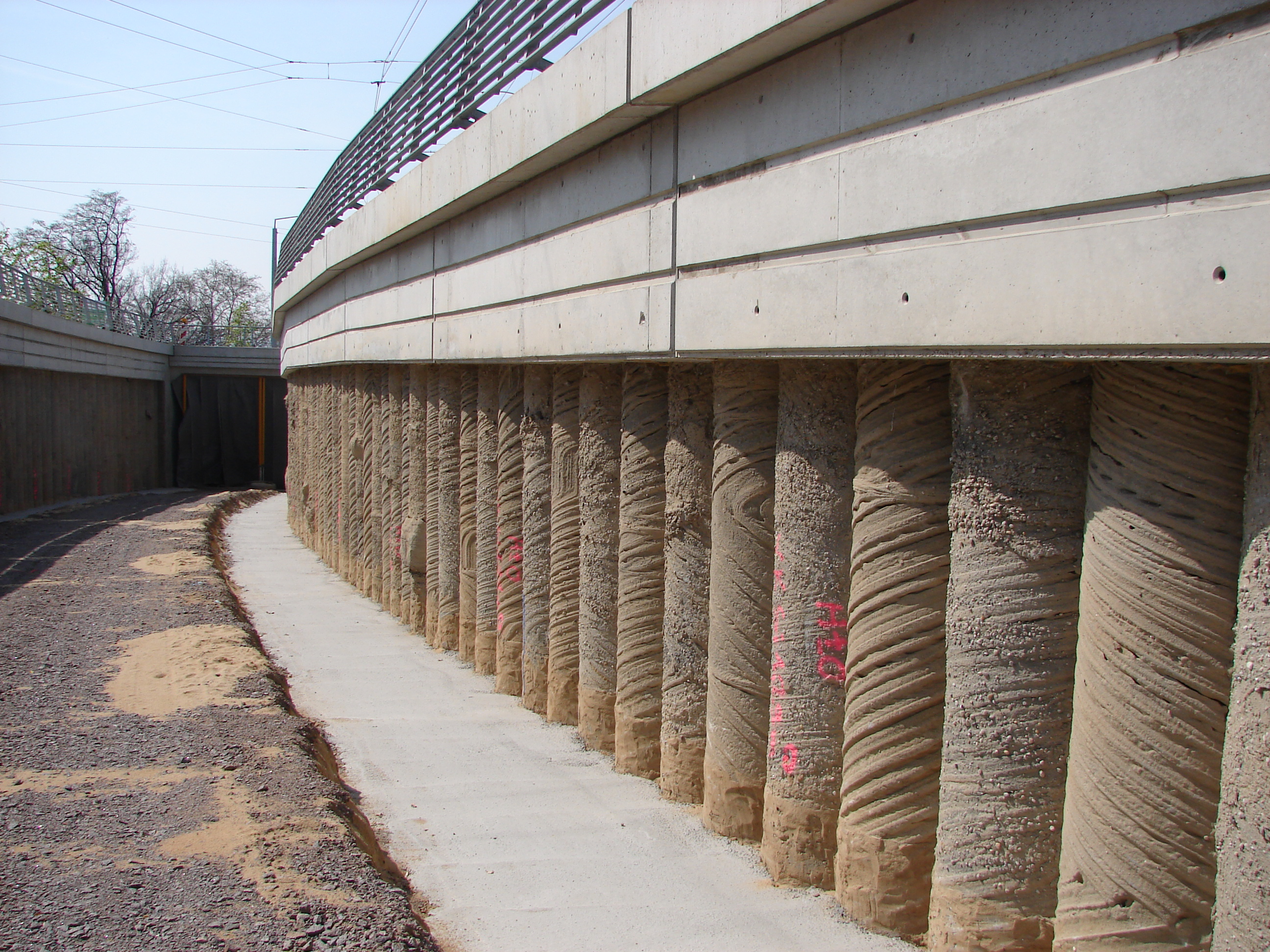 Bohrpfahlwand aus überschnittenen Bohrpfählen als Stützwand des Tunnelportals für die Zufahrt zur Waldschlößchenbrücke im Bereich der Bautzener Straße.